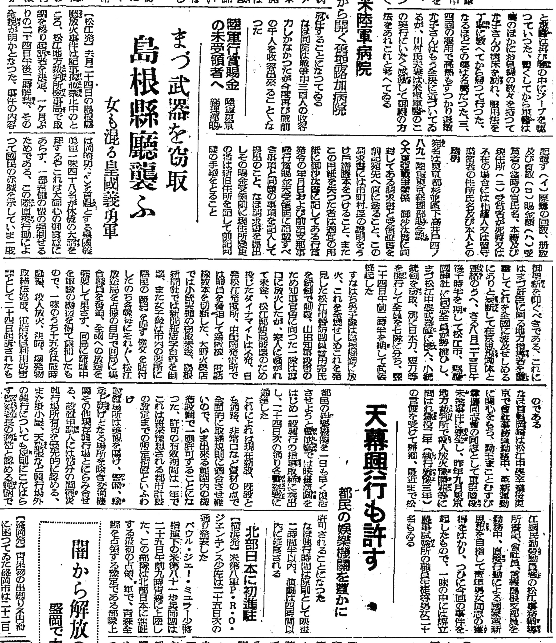 松江騒擾事件の詳細を報じる新聞記事。